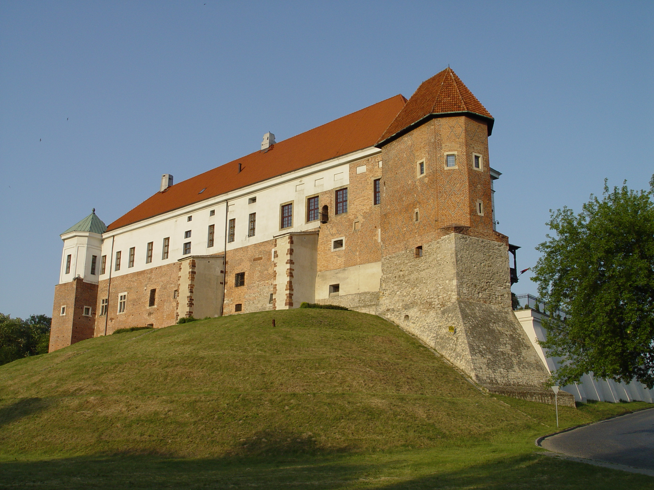 Sandomierz, ul. Zamkowa 12 - zamek królewski, obecnie muzeum okręgowe